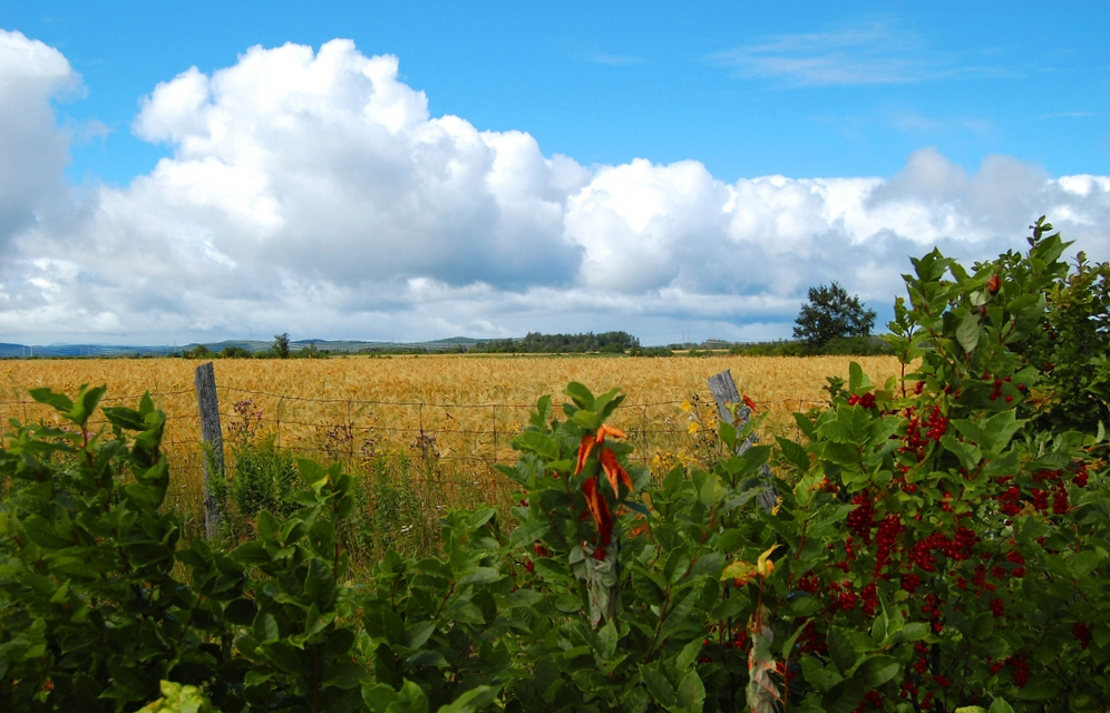 Champ à Laterrière, Québec